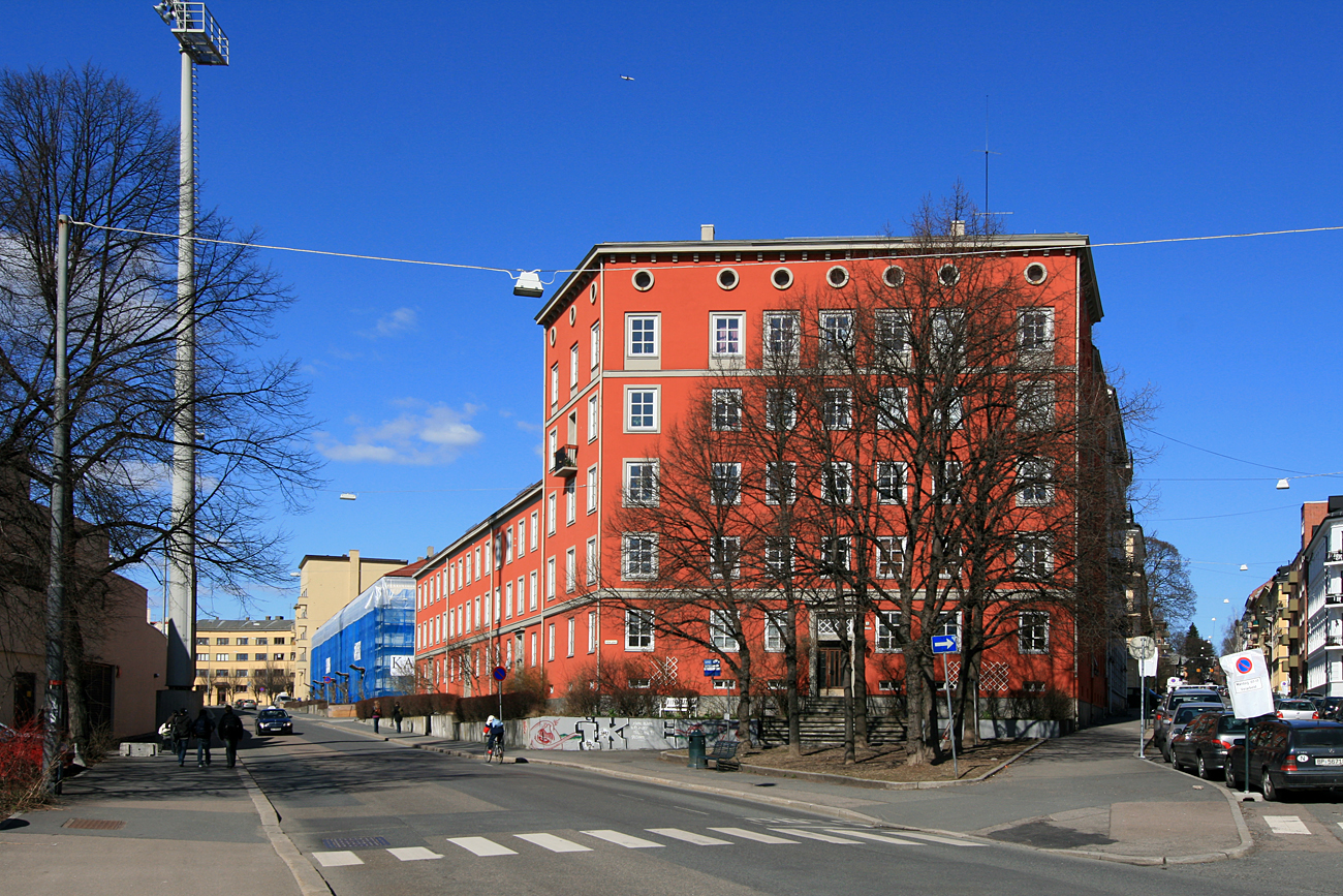 Bislett, Oslo. Til venstre Sofies gate og Bislett stadion. Til høyre Colletts gate.